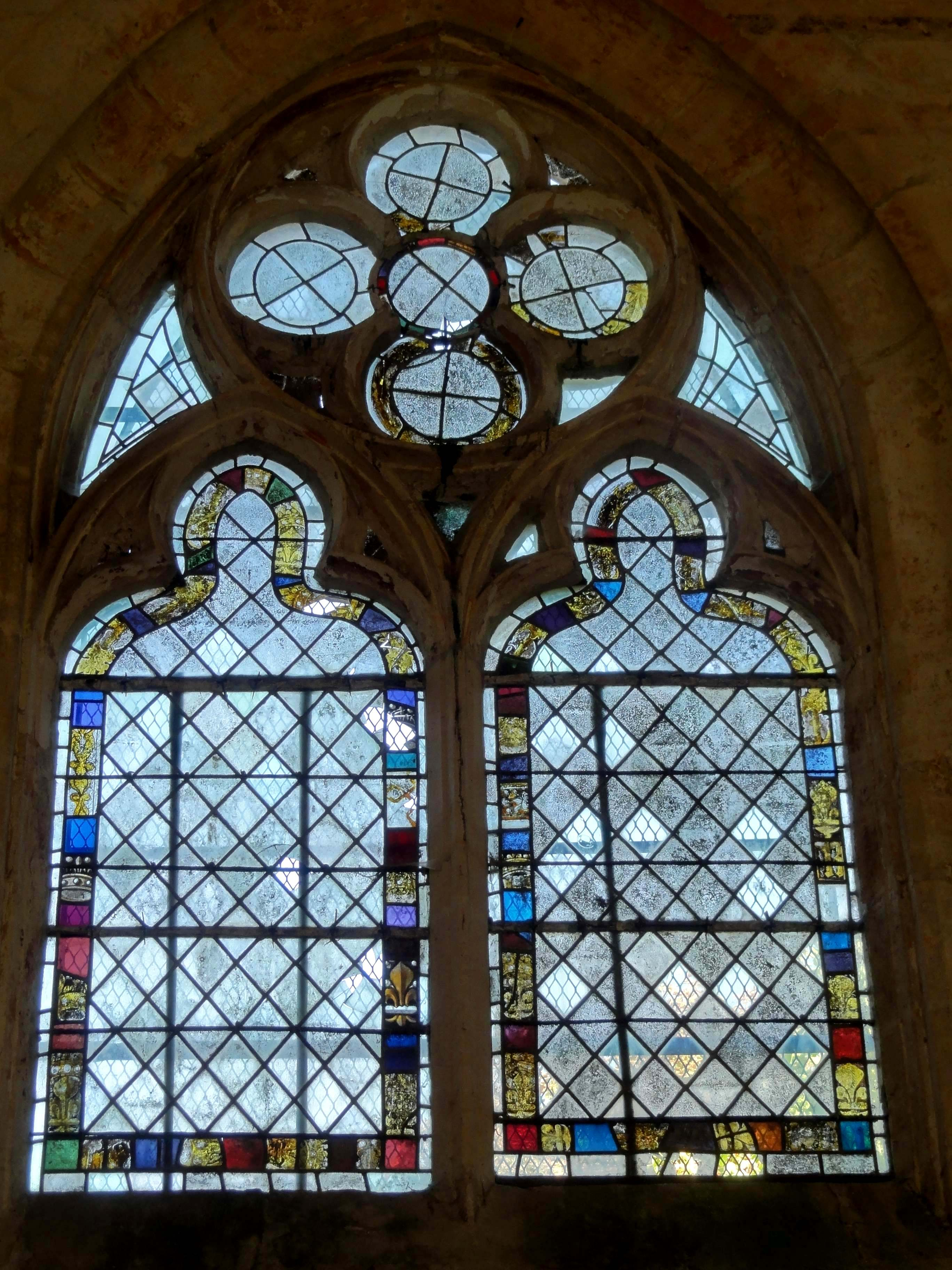 Mobilier de l'église - voir titre.